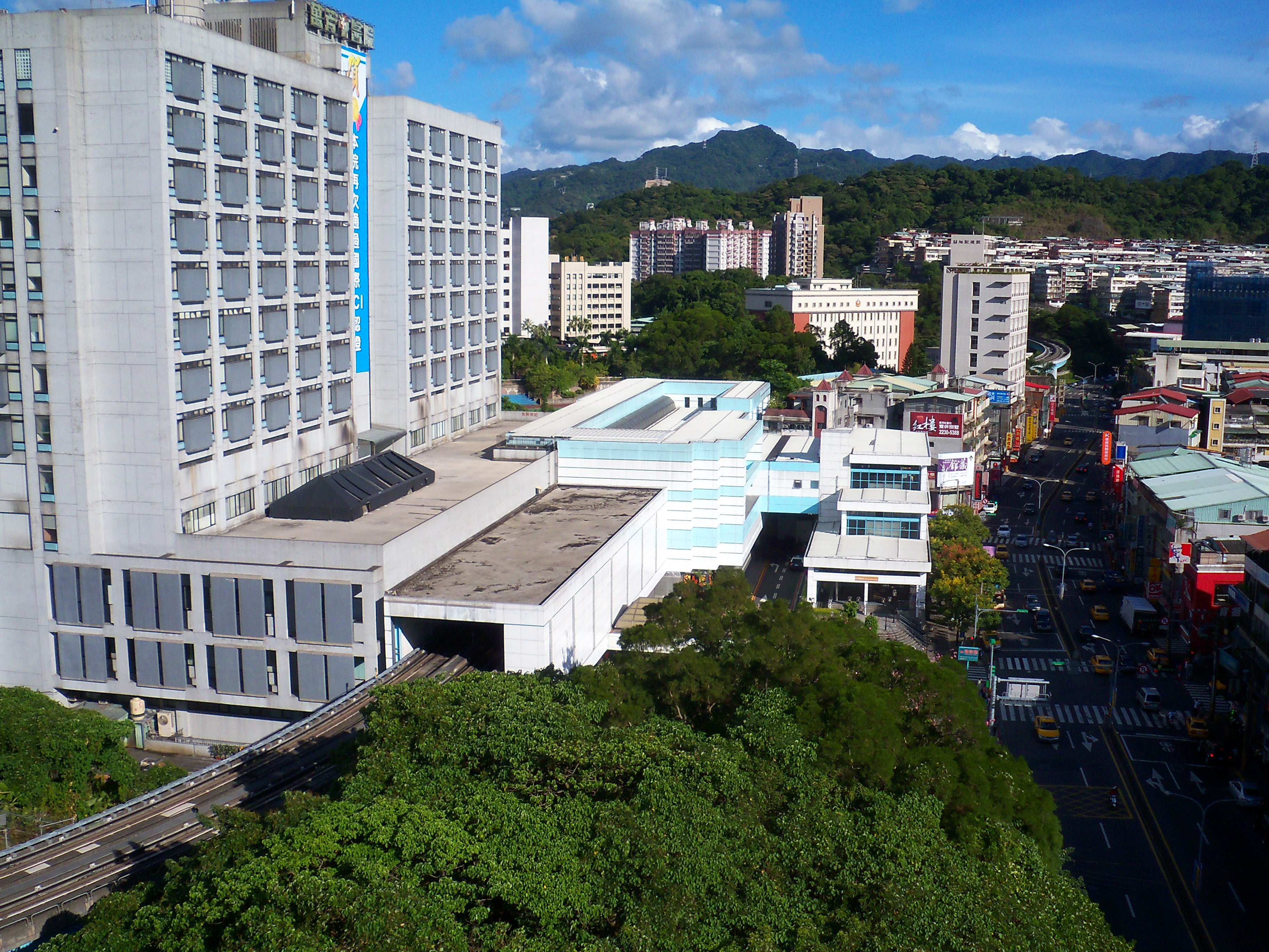 台北捷運文山線万芳病院駅駅舎と万芳病院の鳥瞰。中文（台灣）: 臺北捷運文山線萬芳醫院站與臺北市立萬芳醫院鳥瞰圖。